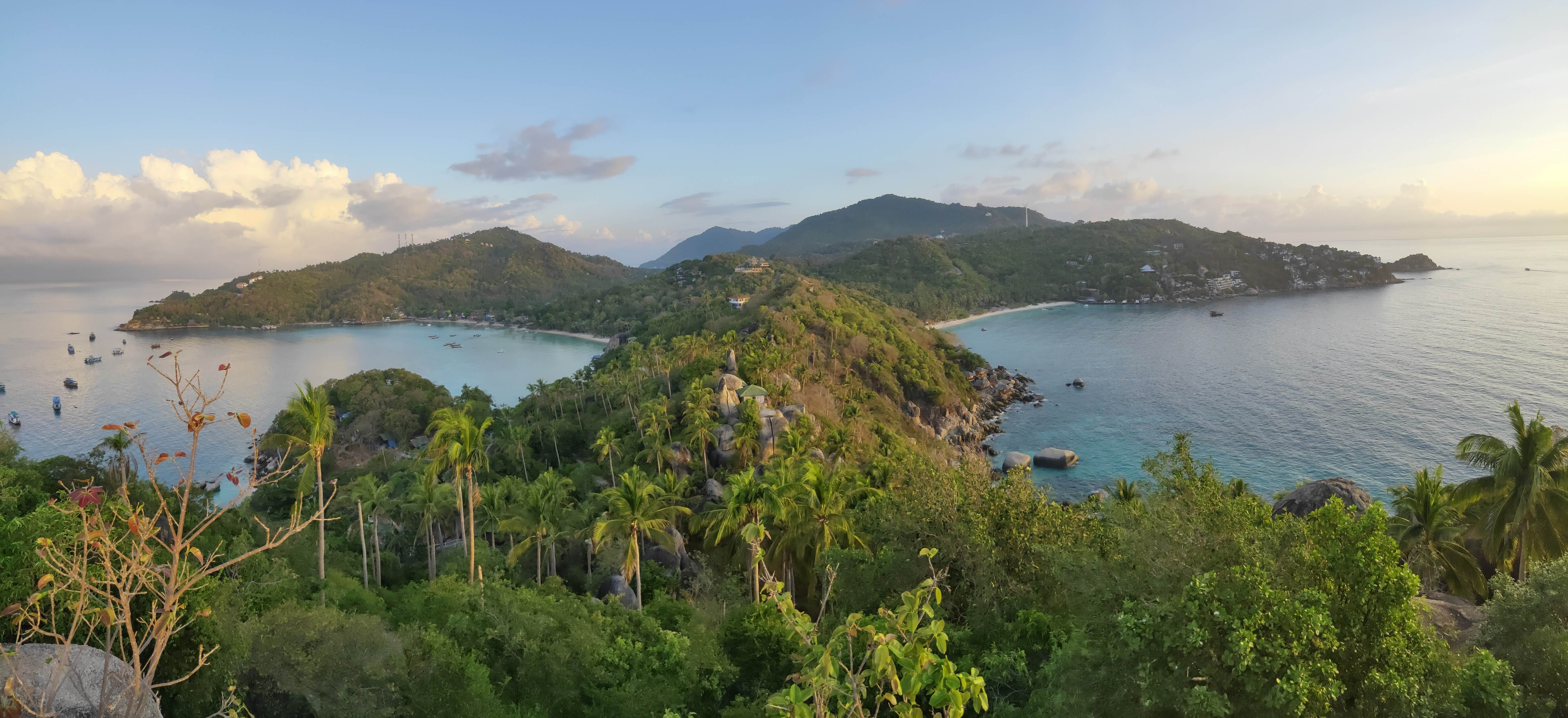 หนึ่งในจุดชมวิวที่สวยที่สุด จอห์น-สุวรรณ